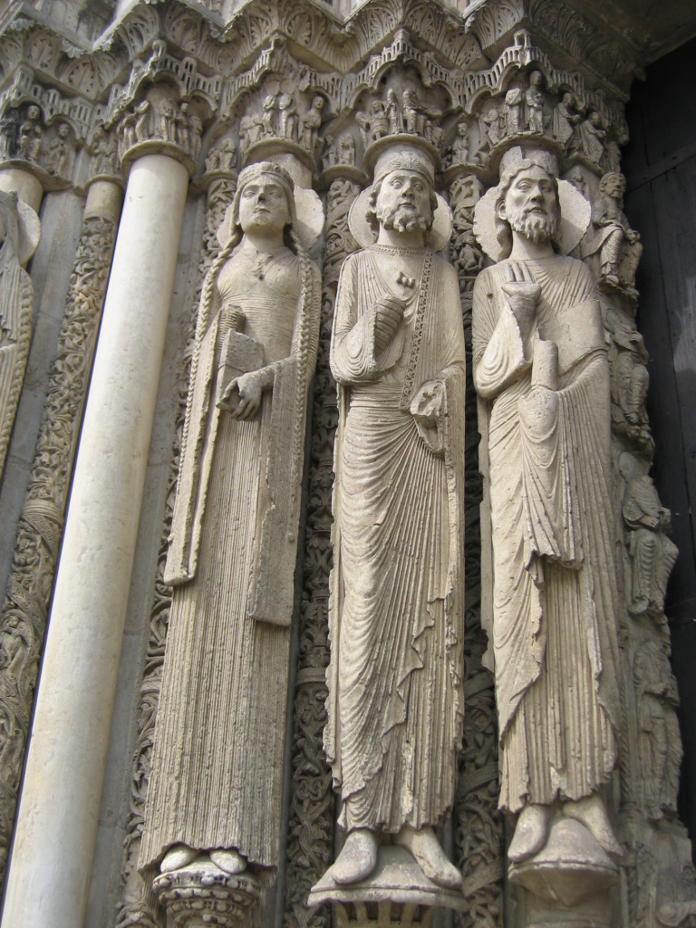 Portail central du porche occidental de la cathédrale de Chartres